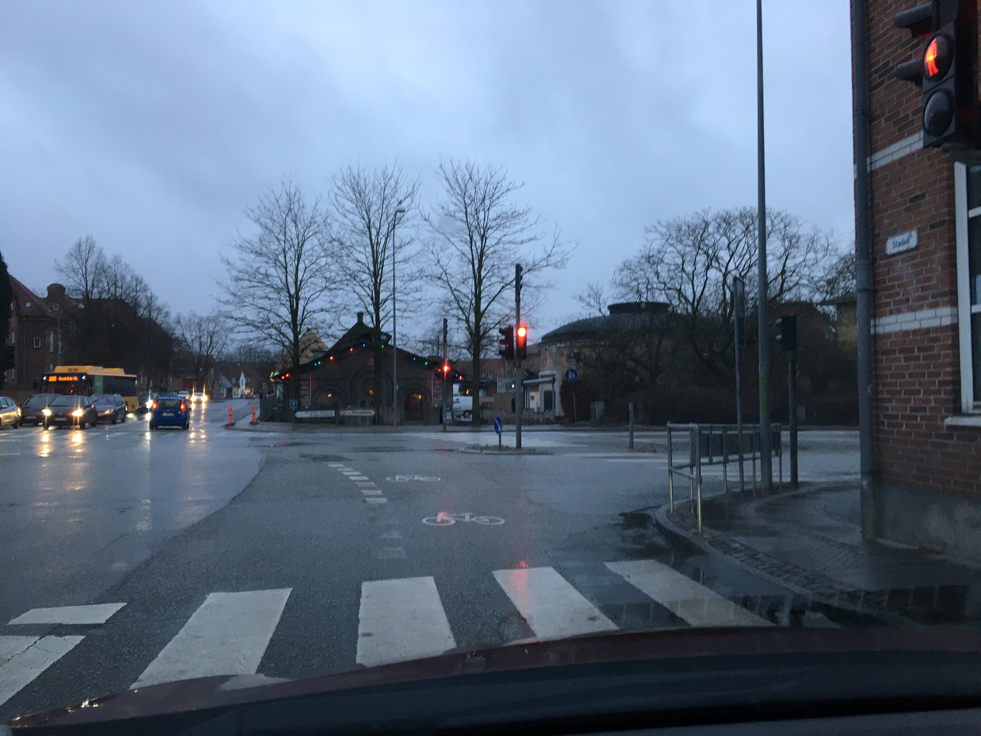 Spillestedet Gimle i Roskilde set fra krydset mellem Støden og Byvolden.